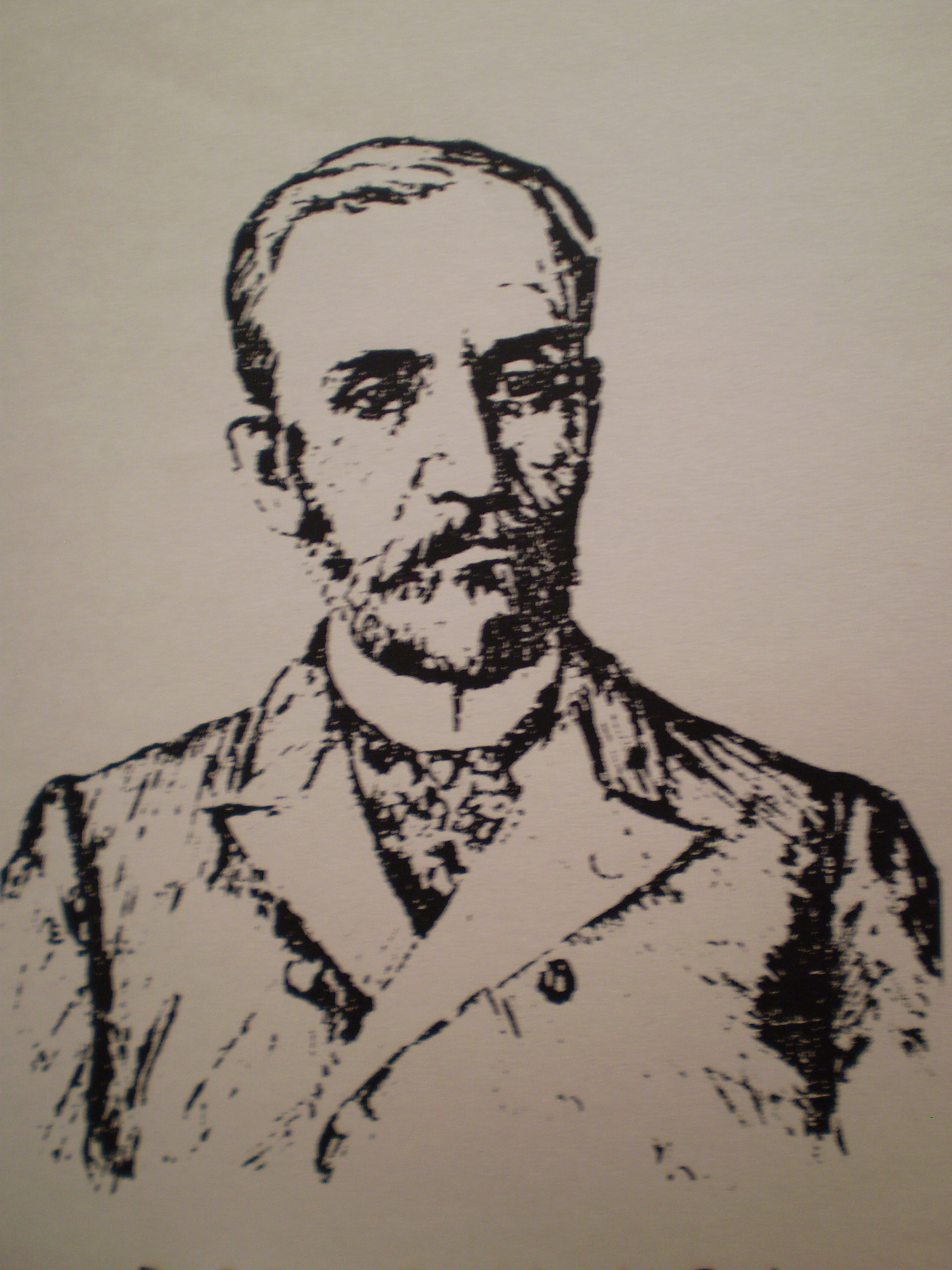 Litografia retratando o personagem do Dr. Balbino Candido da Cunha extraída da obra de David Carneiro.